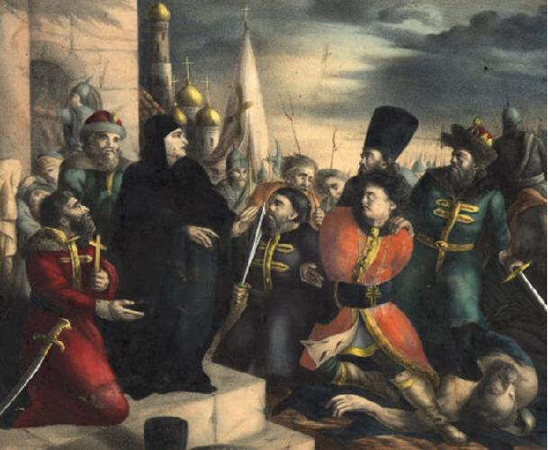 Царица Марфа обличает Лжедмитрия. Раскрашенная литография по эскизу В. Бабушкина. Государственный исторический музей